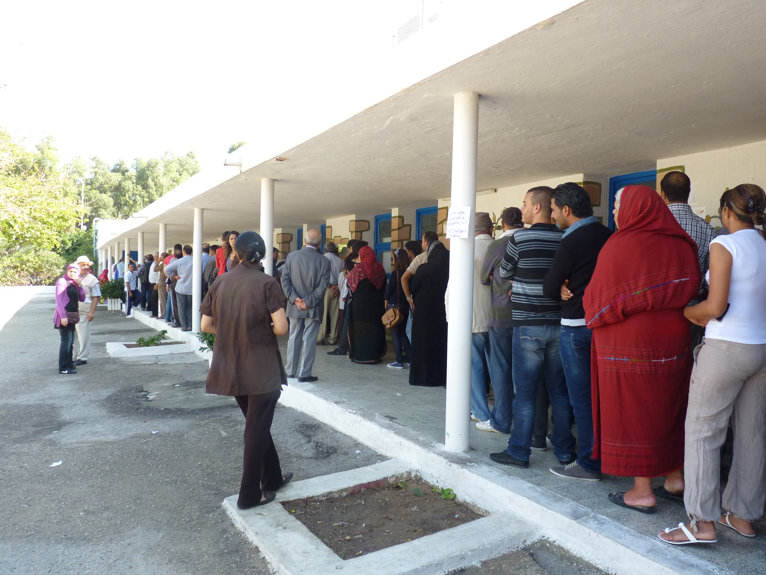 File d'attente devant un bureau de vote dans la région de Sousse à l'occasion de l'élection de l'assemblée constituante le 23 octobre 2011